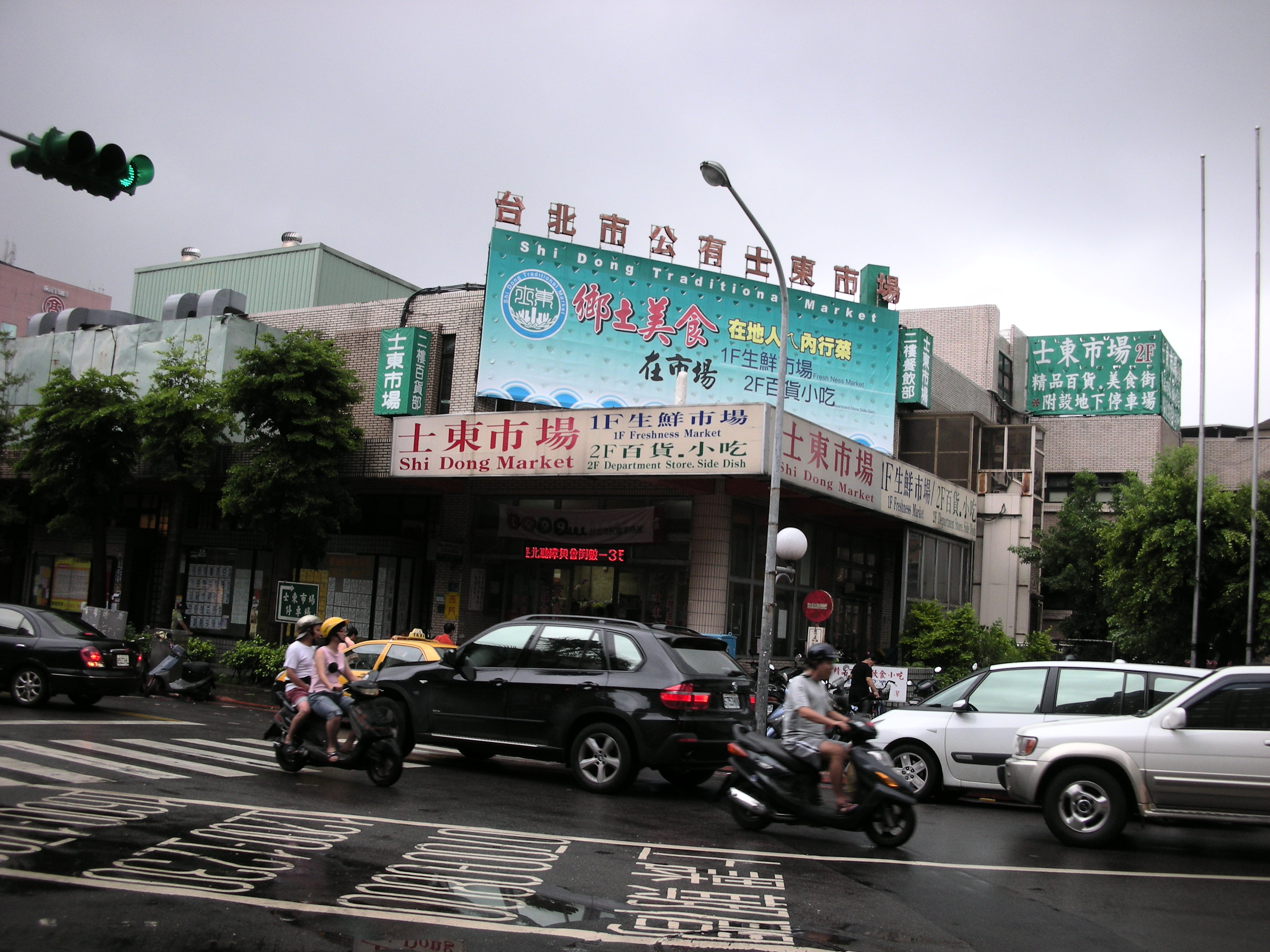 辛樂克颱風來襲外拍(士東市場大門口)